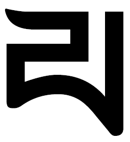 па